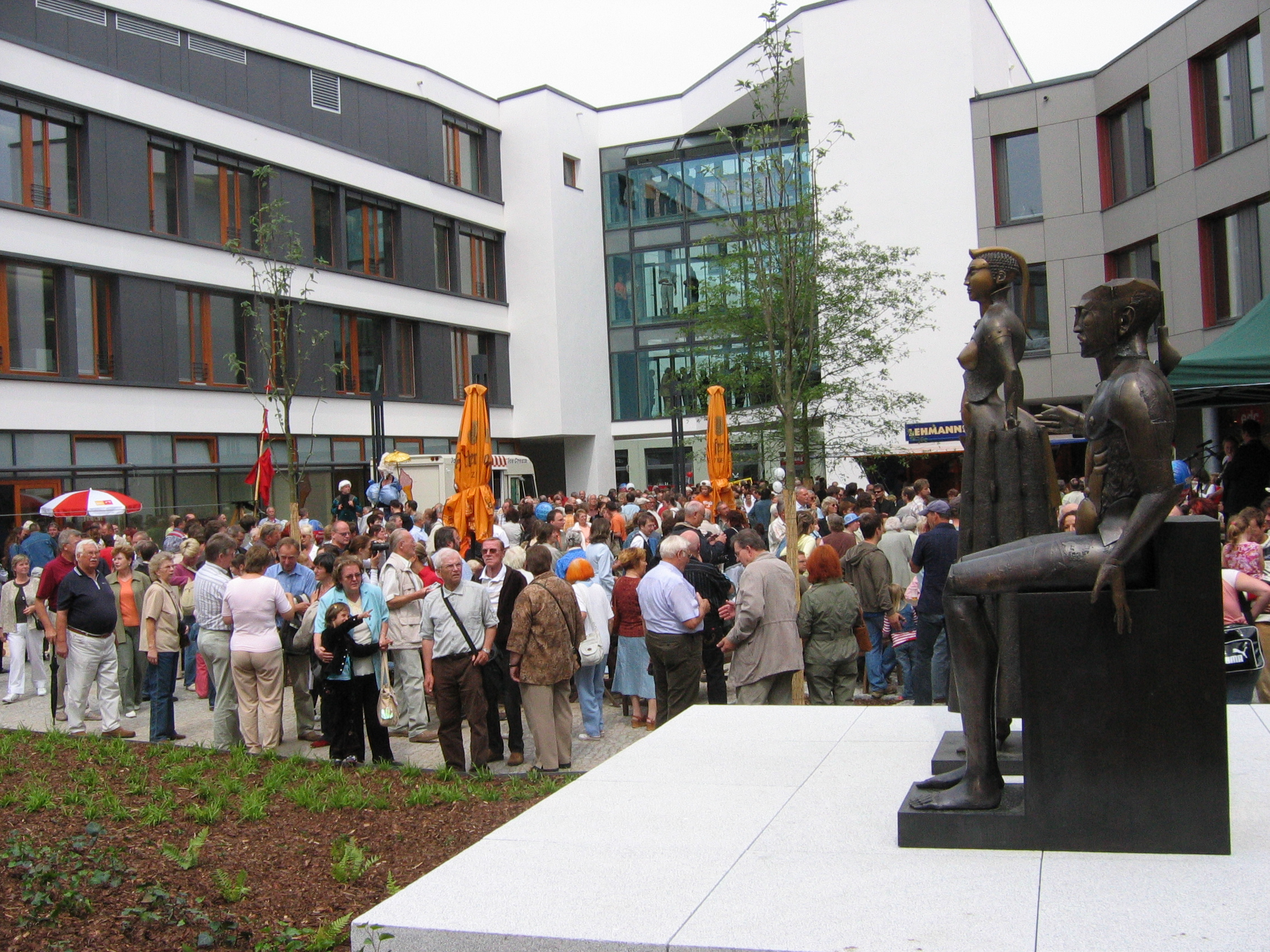 Paul-Wunderlich-Haus während der Eröffnungsfeier